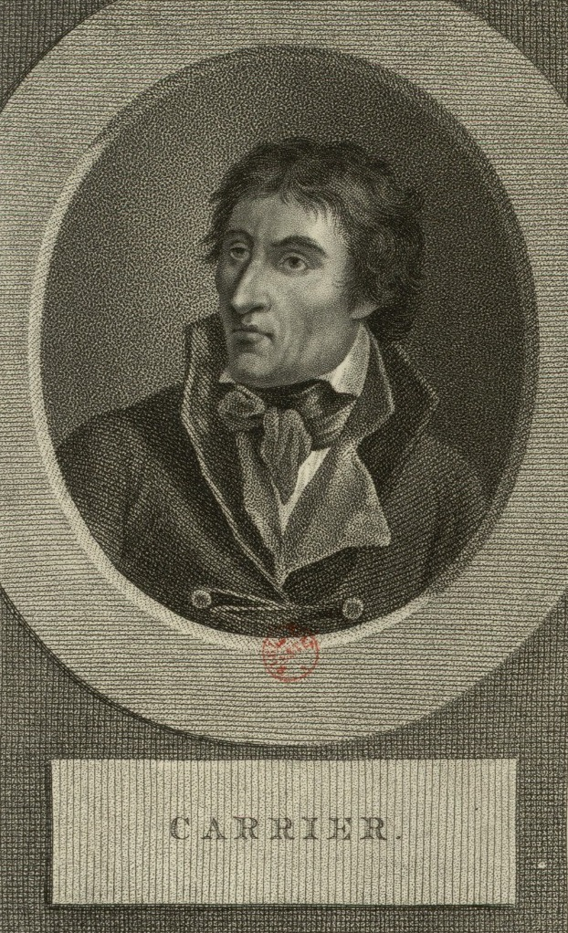 Carrier, estampe, 1805